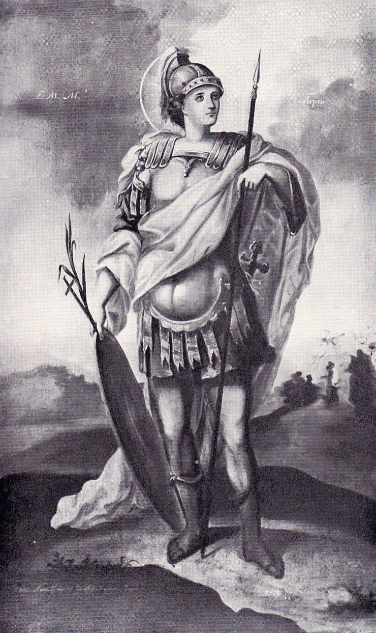 Nicolae Grigoescu - Icoana Sfântului Gheorghe de la biserica din Băicoi